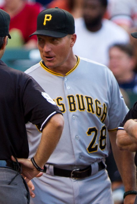 Jeff Banister